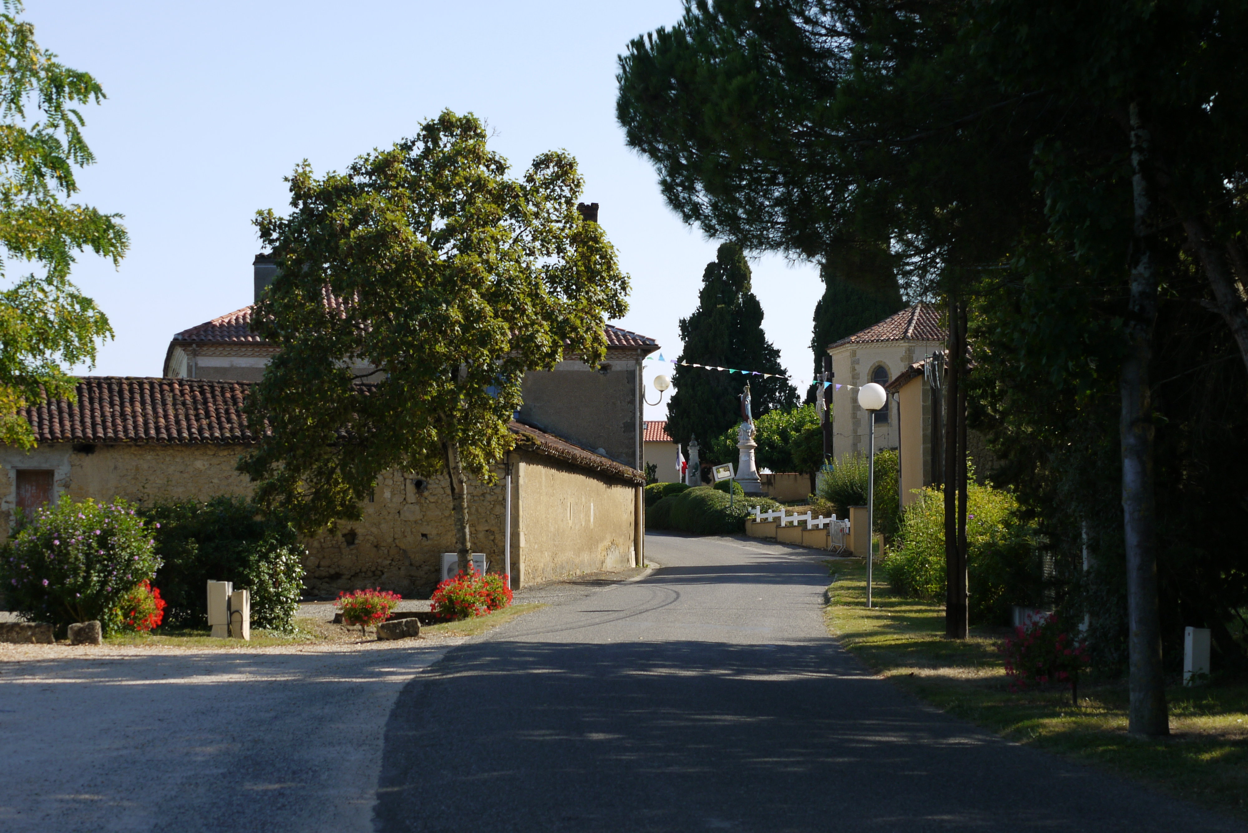 L'entrée nord de Clermont-Pouyguillès